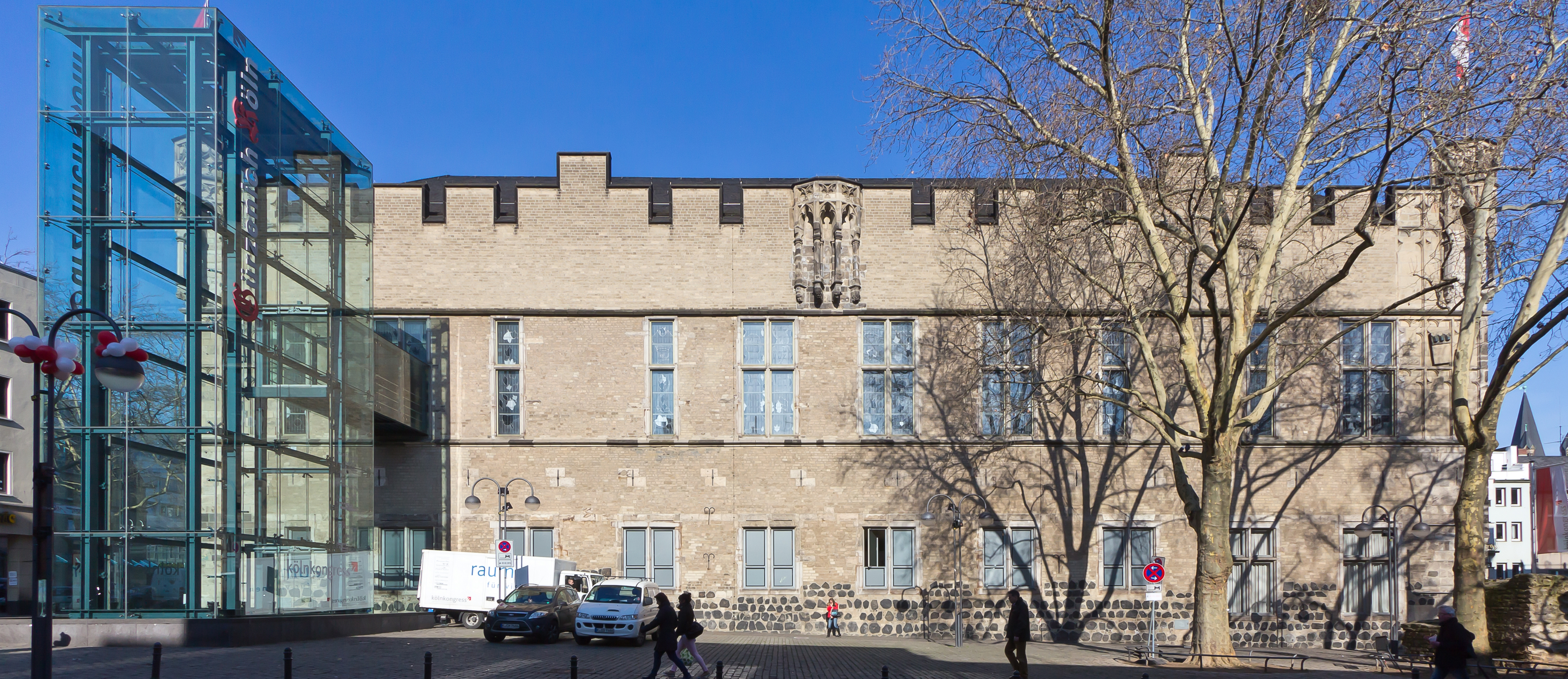 Südseite des Gürzenich, Köln. Der Platz vor der Südseite des Gürzenich wurde 2010 nach dem Dirigenten Günter Wand als „Günter-Wand-Platz“ benannt.